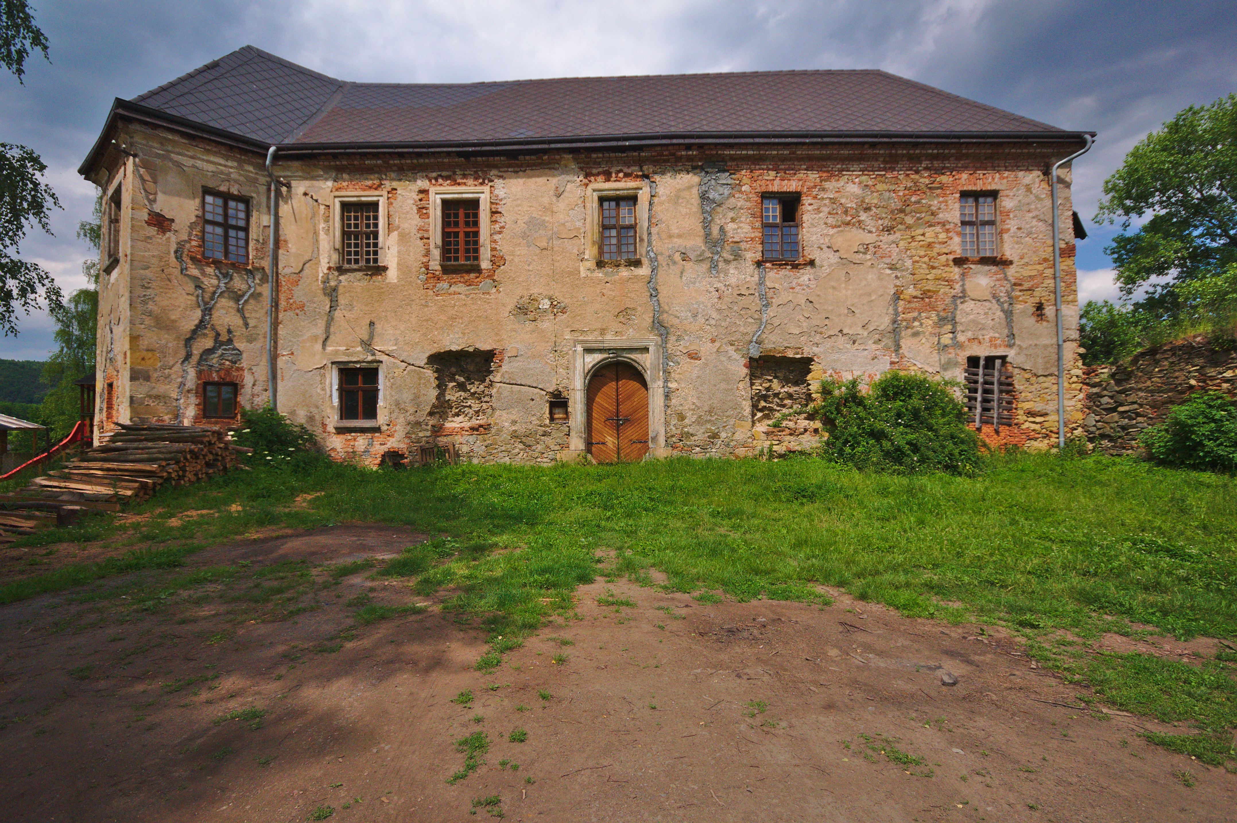 Zámeček Vranová Lhota, Vranová Lhota, okres Svitavy